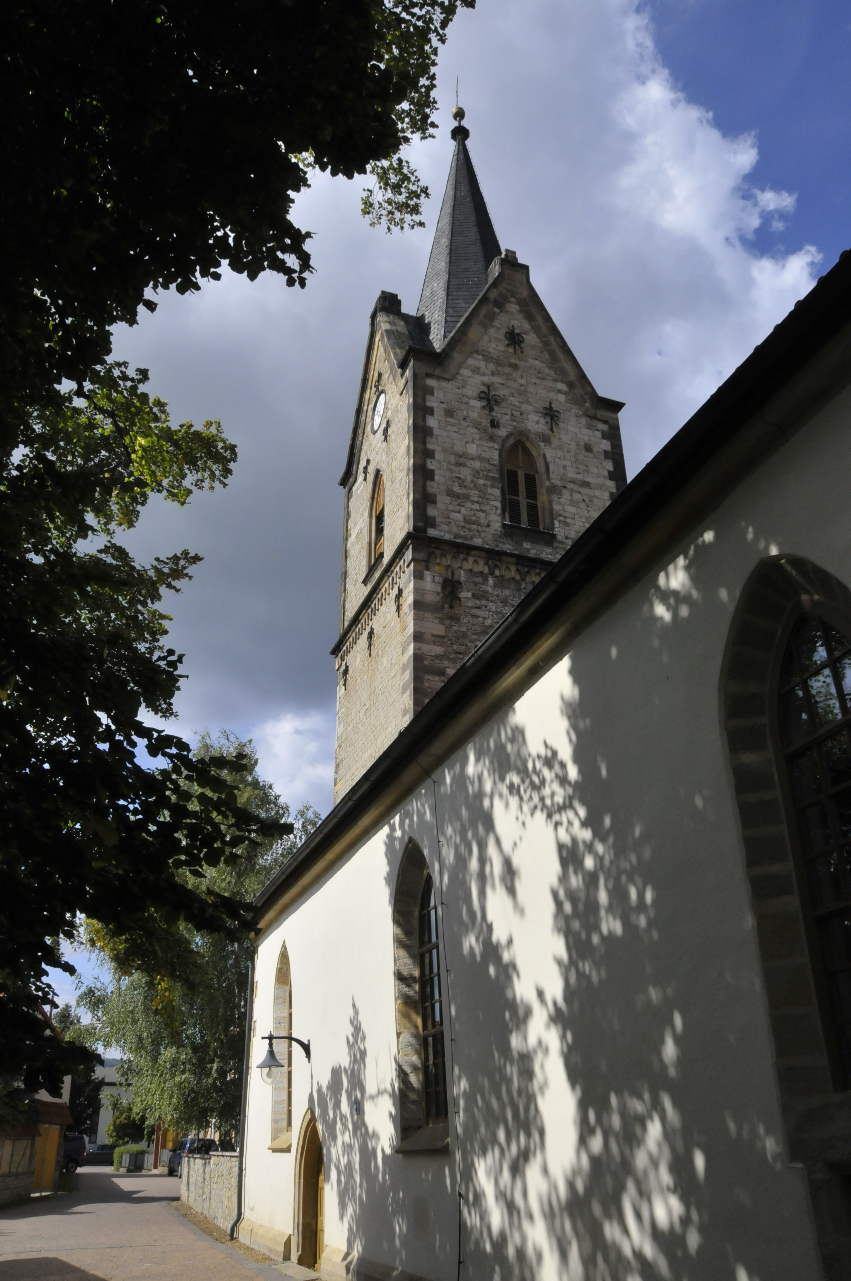 Großfahner, Kirche